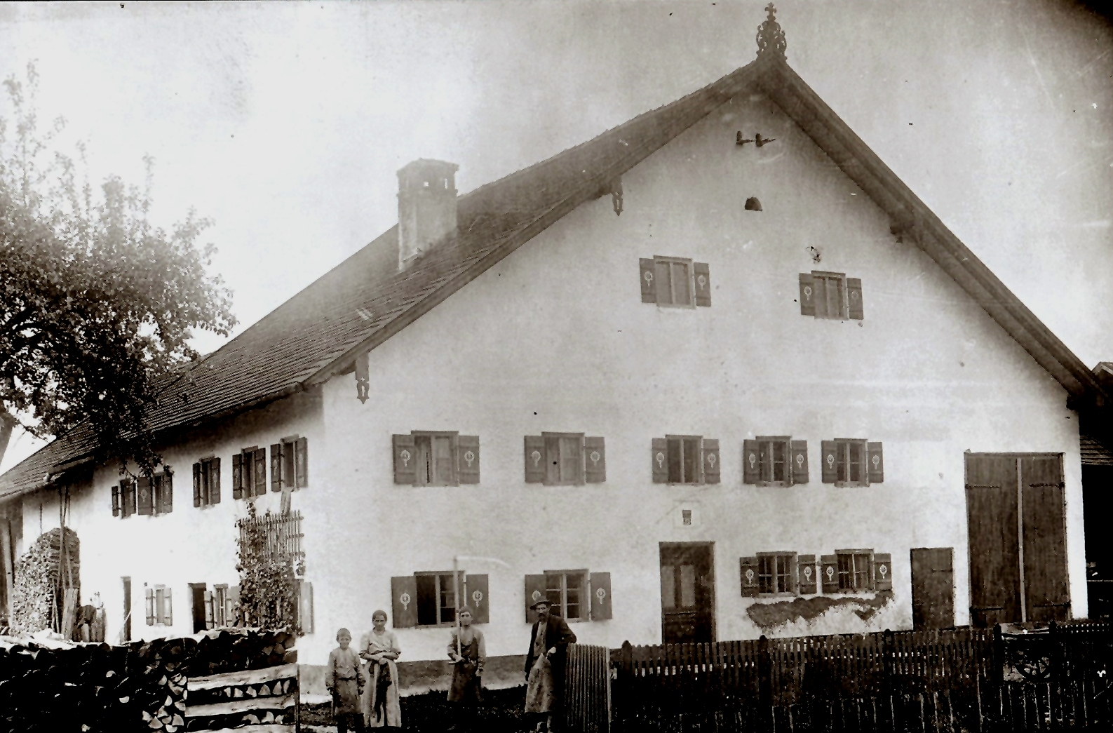 Starnberg, OT Perchting, Pöckinger Str. 20. „Beim Herrnbauer” um 1911. Dorfplan:Haus 25